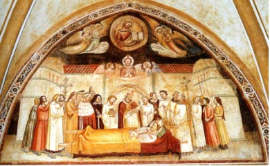 Vitale da Bologna - Funerali di san Nicolò - Duomo di Udine affresco - dopo il 1348